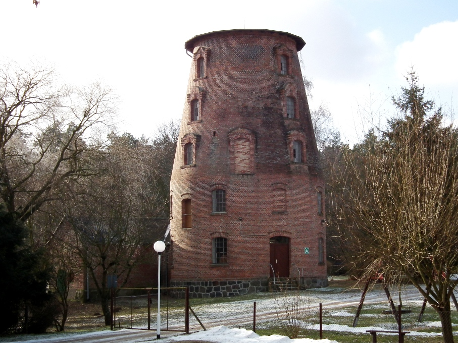 niedaleko Boock - dom opieki, a na jego terenie stary wiatrak, niestety bez skrzydeł